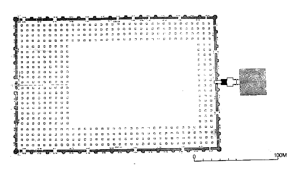 Samaraa_Grand_Mosque